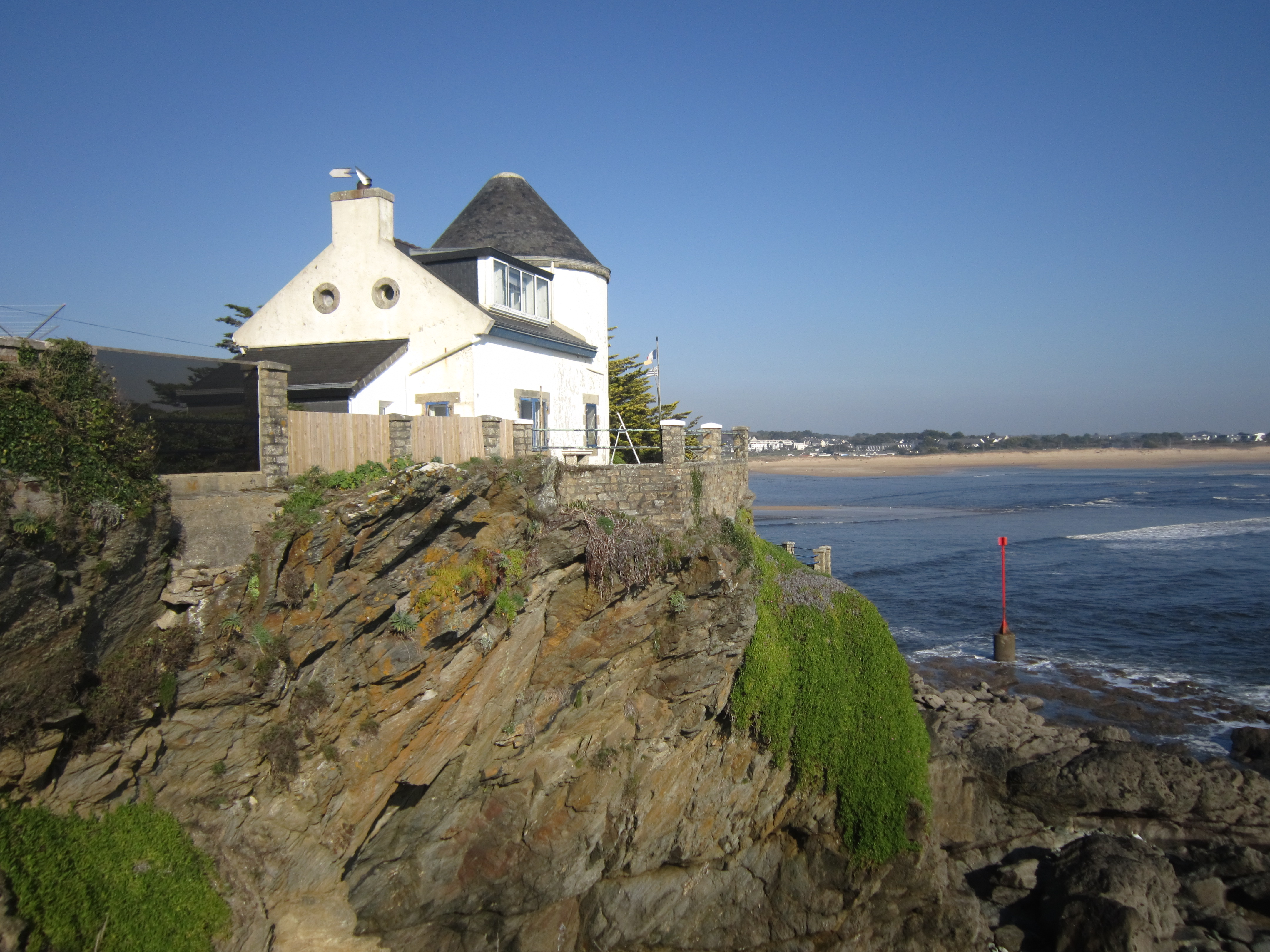 Le Pouldu : la maison du mät pilote (ou mât Fénoux), sorte de sémaphore à usage civil mis en service en 1847 ; la tour visible sur la photographie servait de support à un mât de 15 mètres de haut au sommet duquel un bras articulé pouvait être articulé à partir du sol ; selon ses positions, il servait de guidage pour les navires entrant dans la Laïta afin d'éviter la barre du Pouldu. Le système fut désaffecté en 1924.